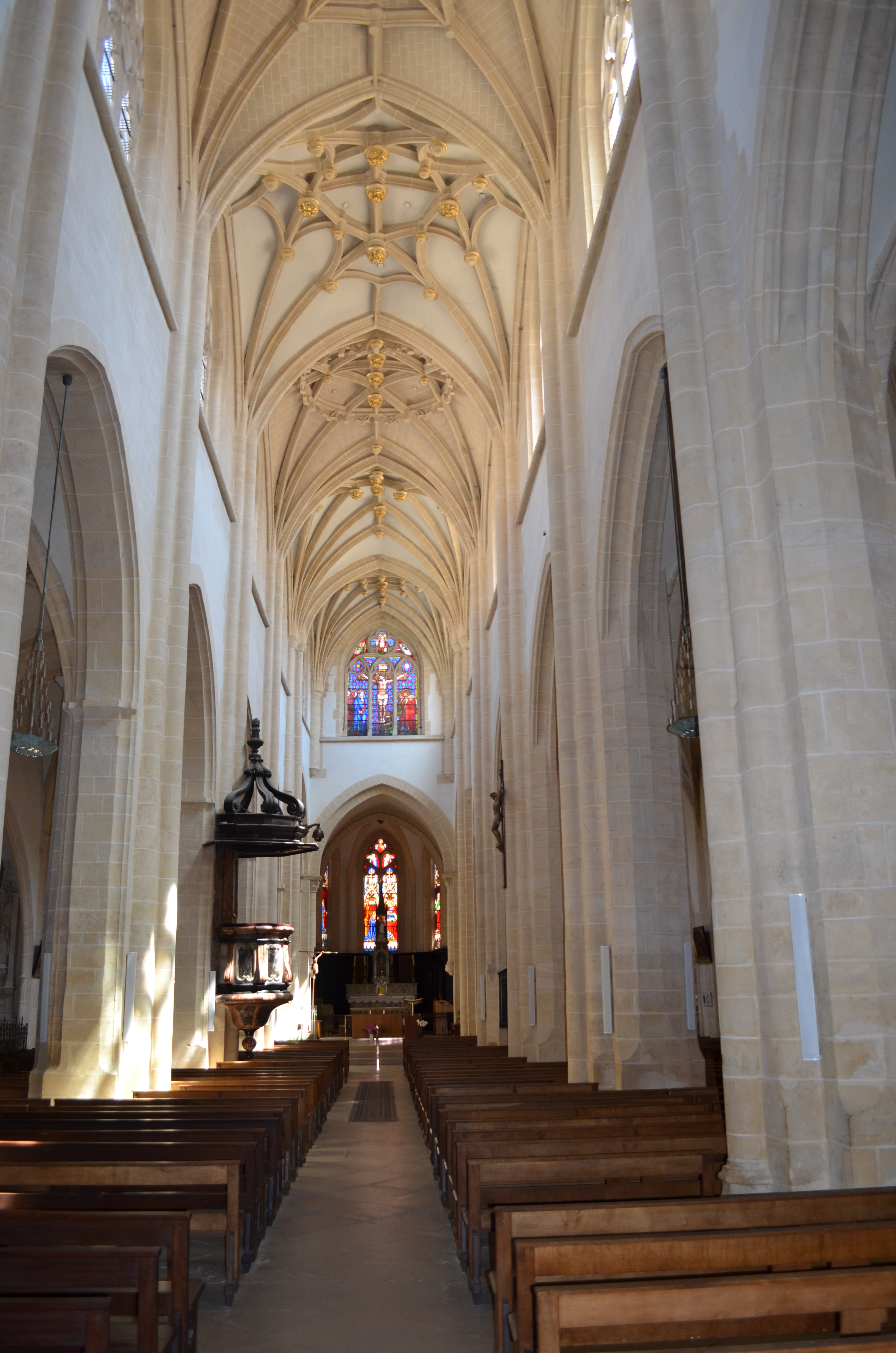 Vue intérieure - Église Notre-Dame-des-Marais de Villefranche-sur-Saône.